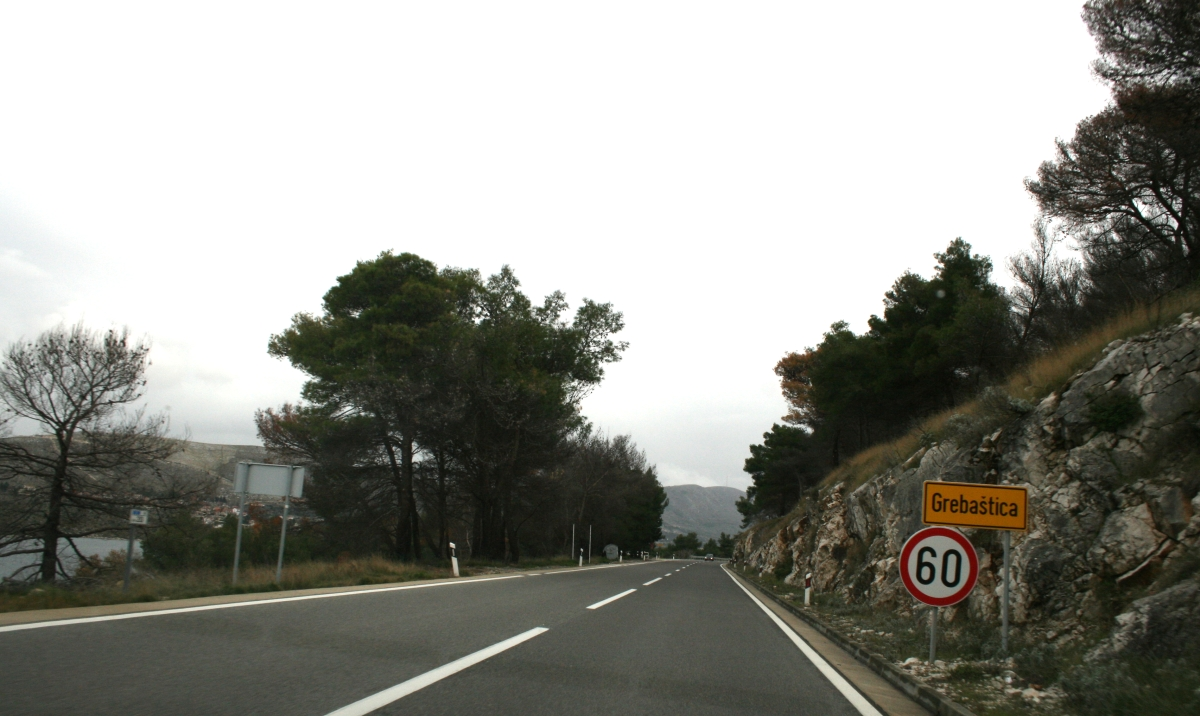 Split-Šibenik